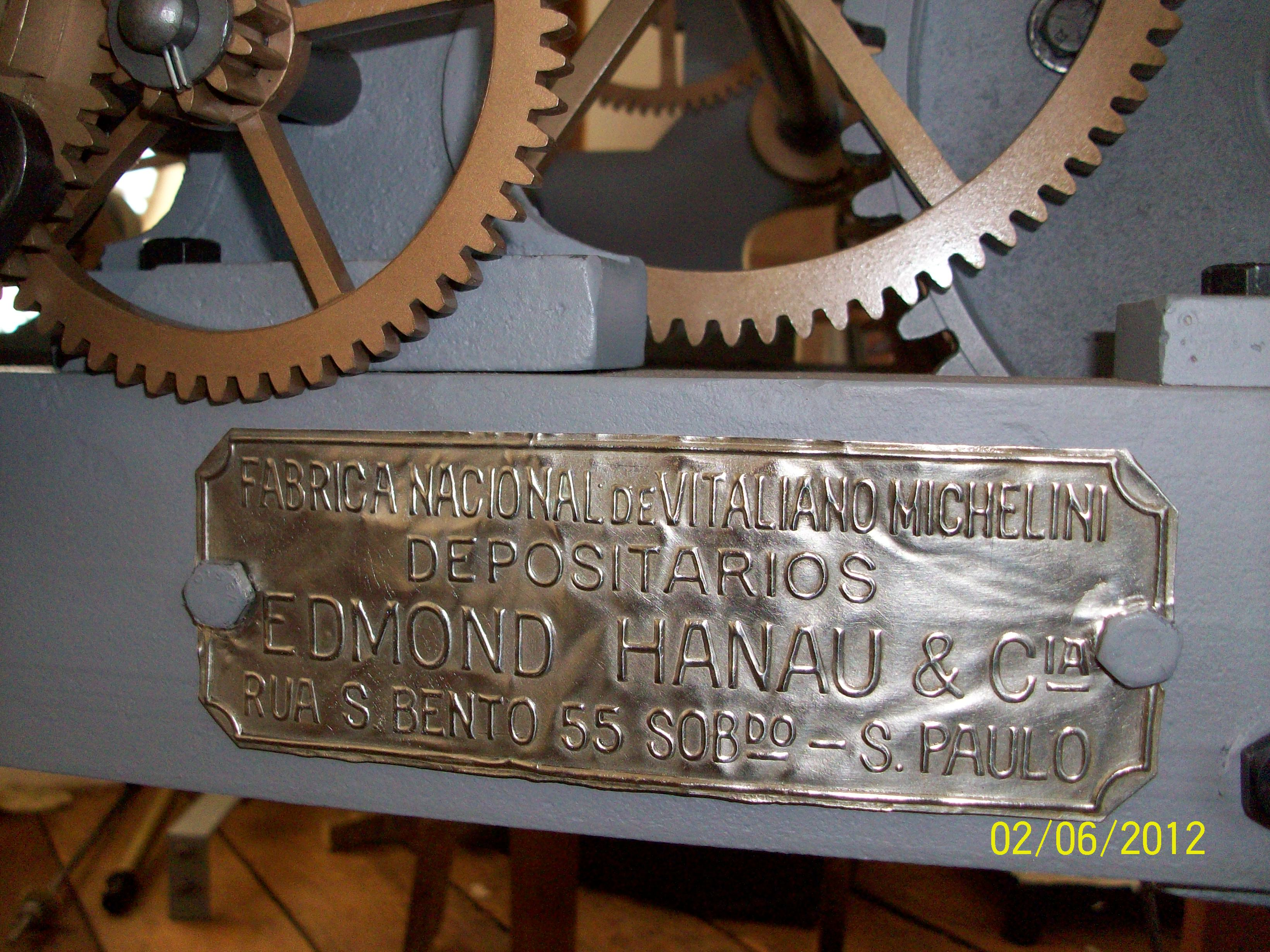 Placa do relógio Michelini da Igreja Sto. Antonio em São Carlos - SP, após a restauração.